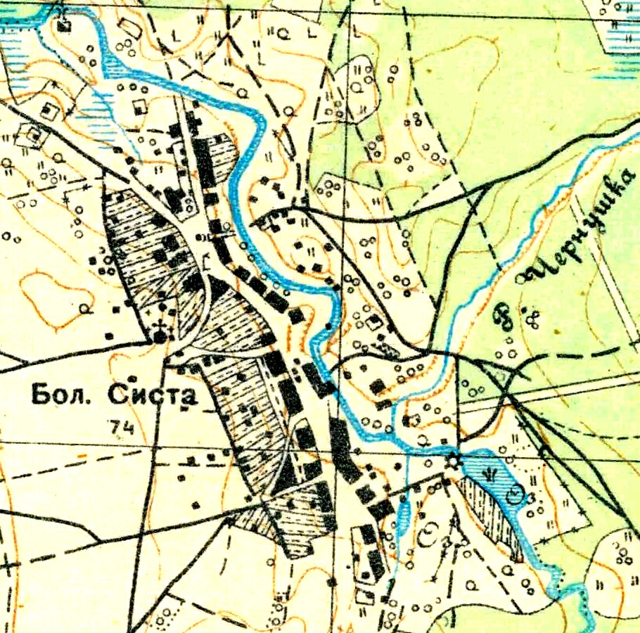 Топографическая карта Ленинградской области, квадрат О-35-23-А-а (Большая Систа), деревня Систа.